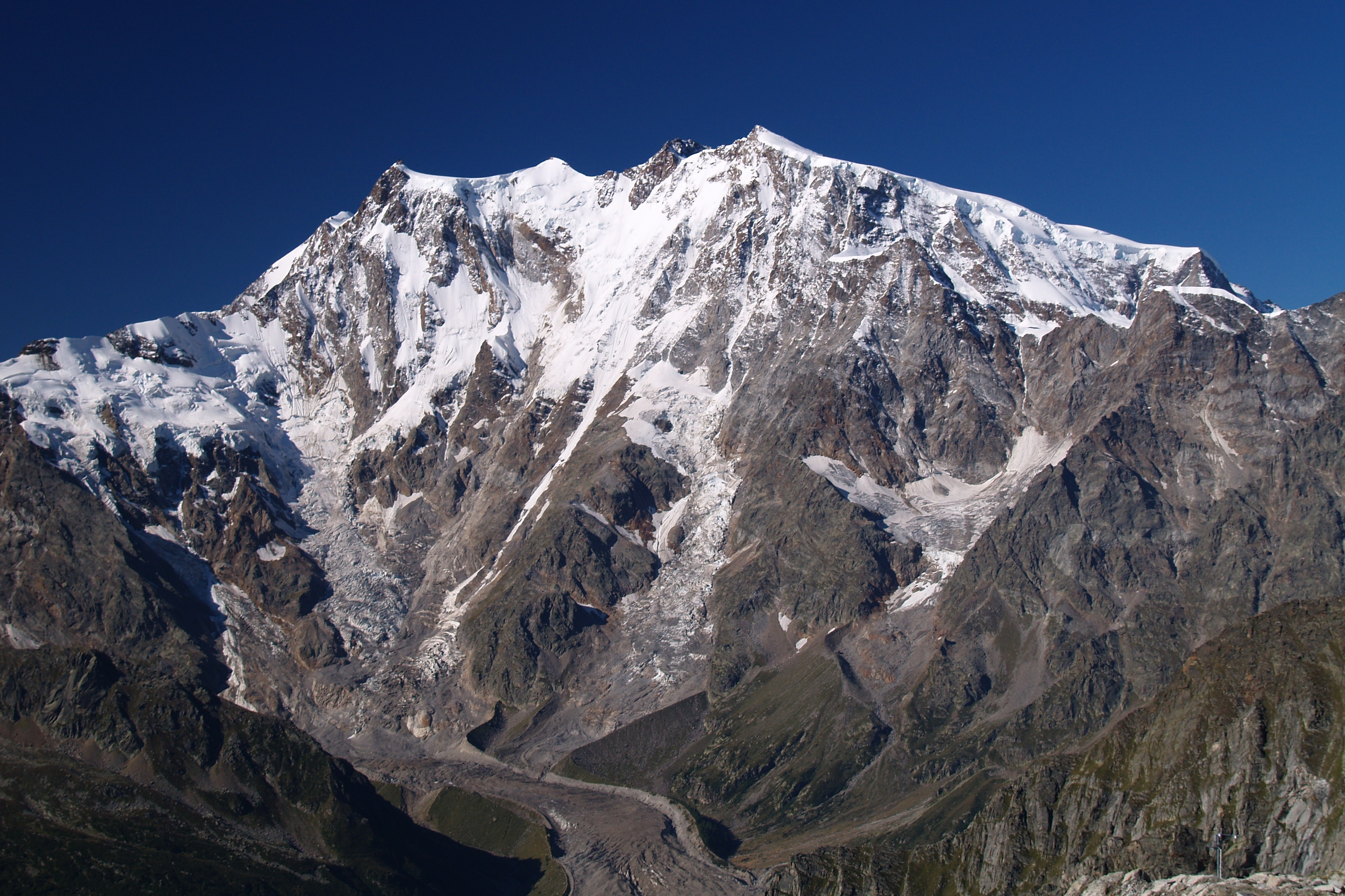 Monte Rosa east side from Monte Moro Pass